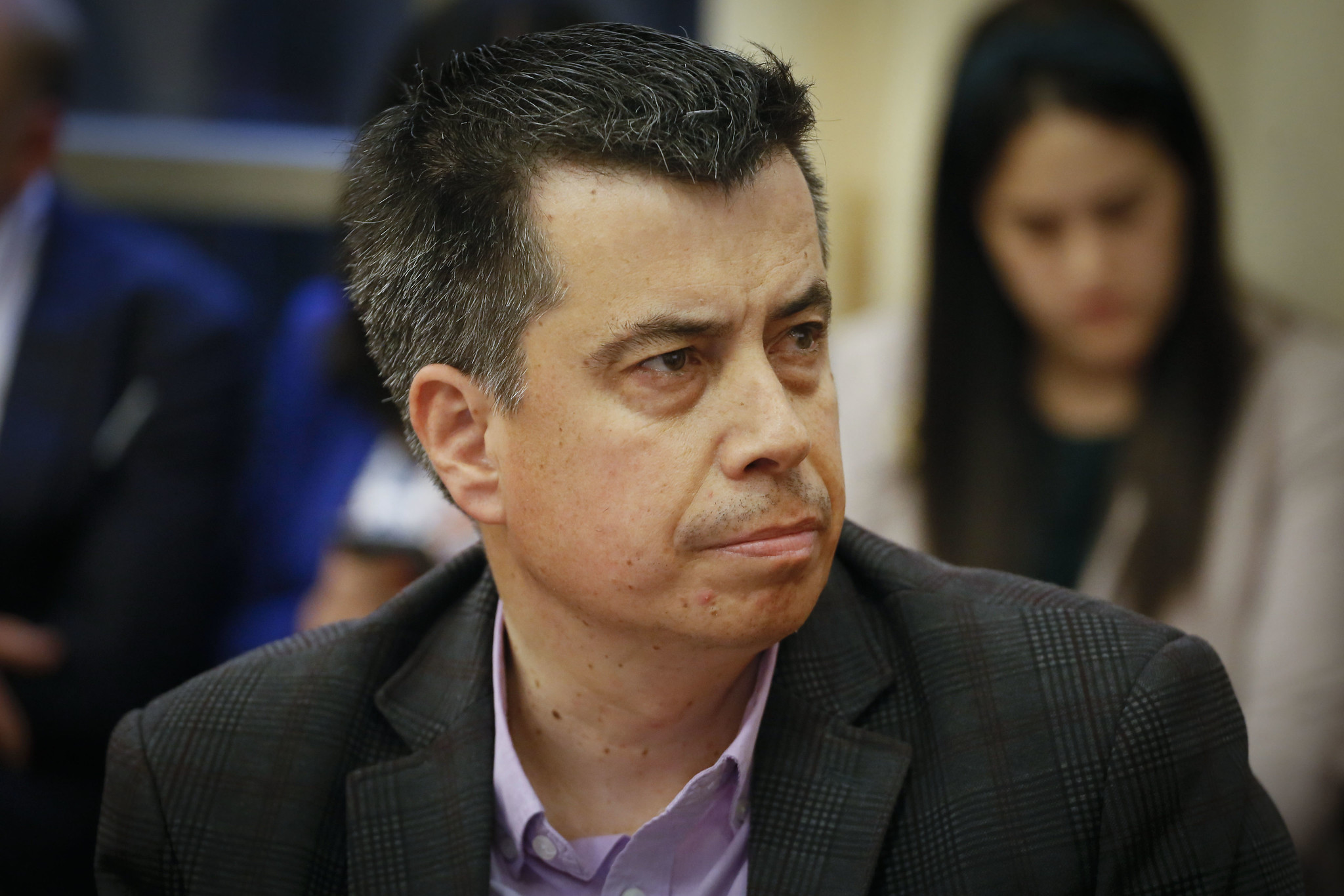 Andrés Celis Montt Diputado por el Distrito Nº7, de la región de Valparaíso